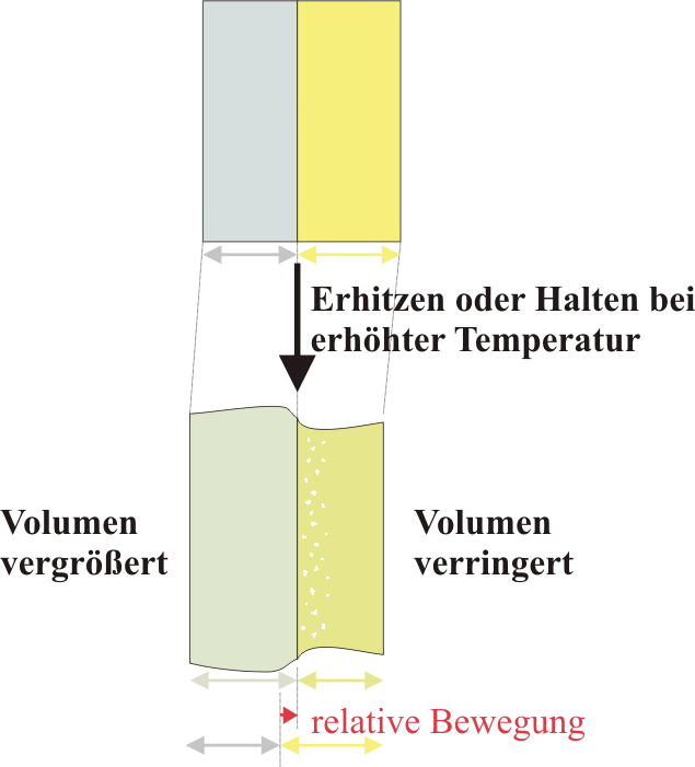 Schematische Darstellung des Kirkendall-Effekts: Volumenveränderungen und Verschiebung der Phasengrenze, wenn zwischen Festkörpern Diffusion erfolgt. Bild selbst neu erstellt und zu png konvertiert.